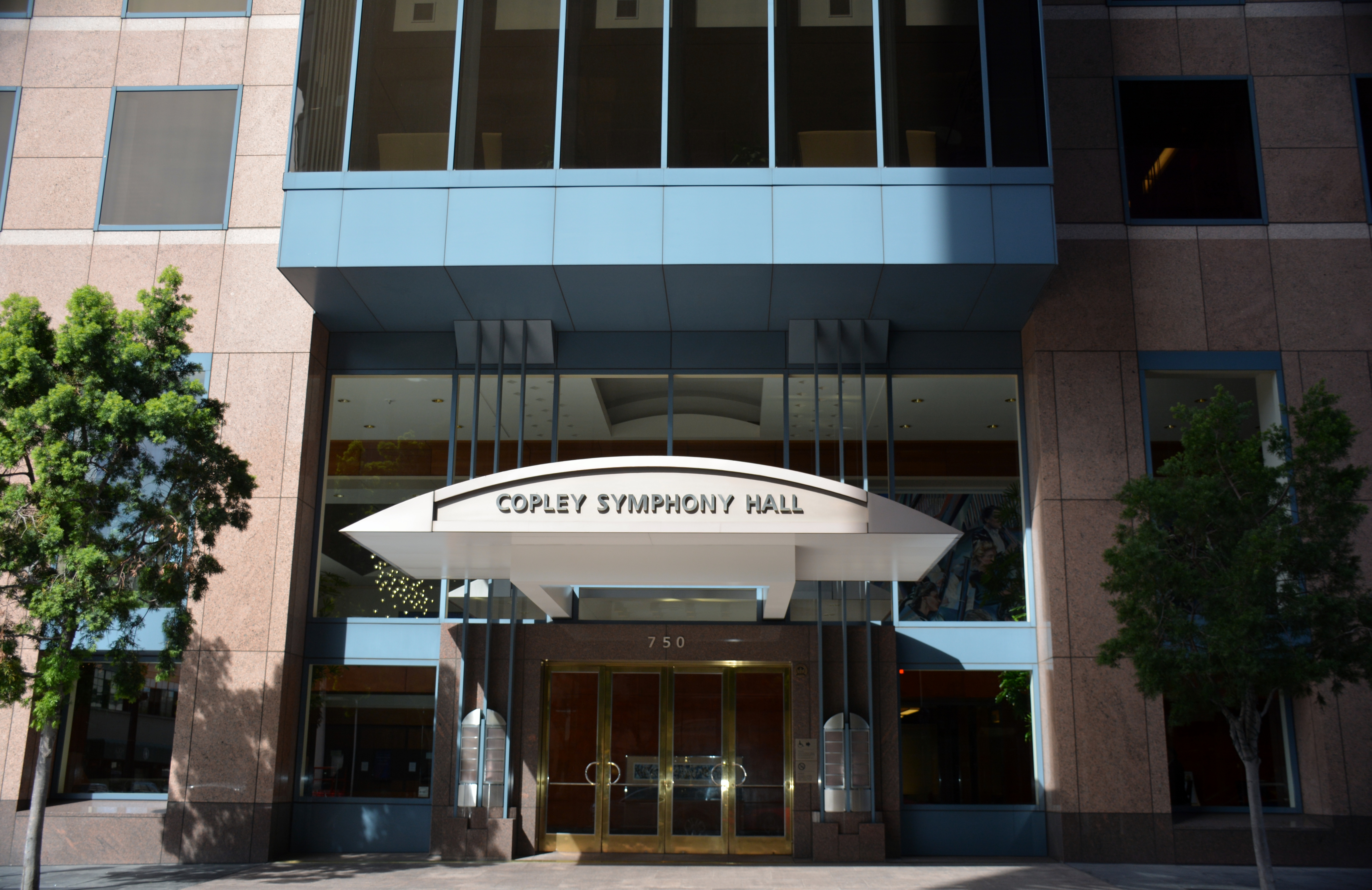 Core-Columbia, San Diego, CA, USA